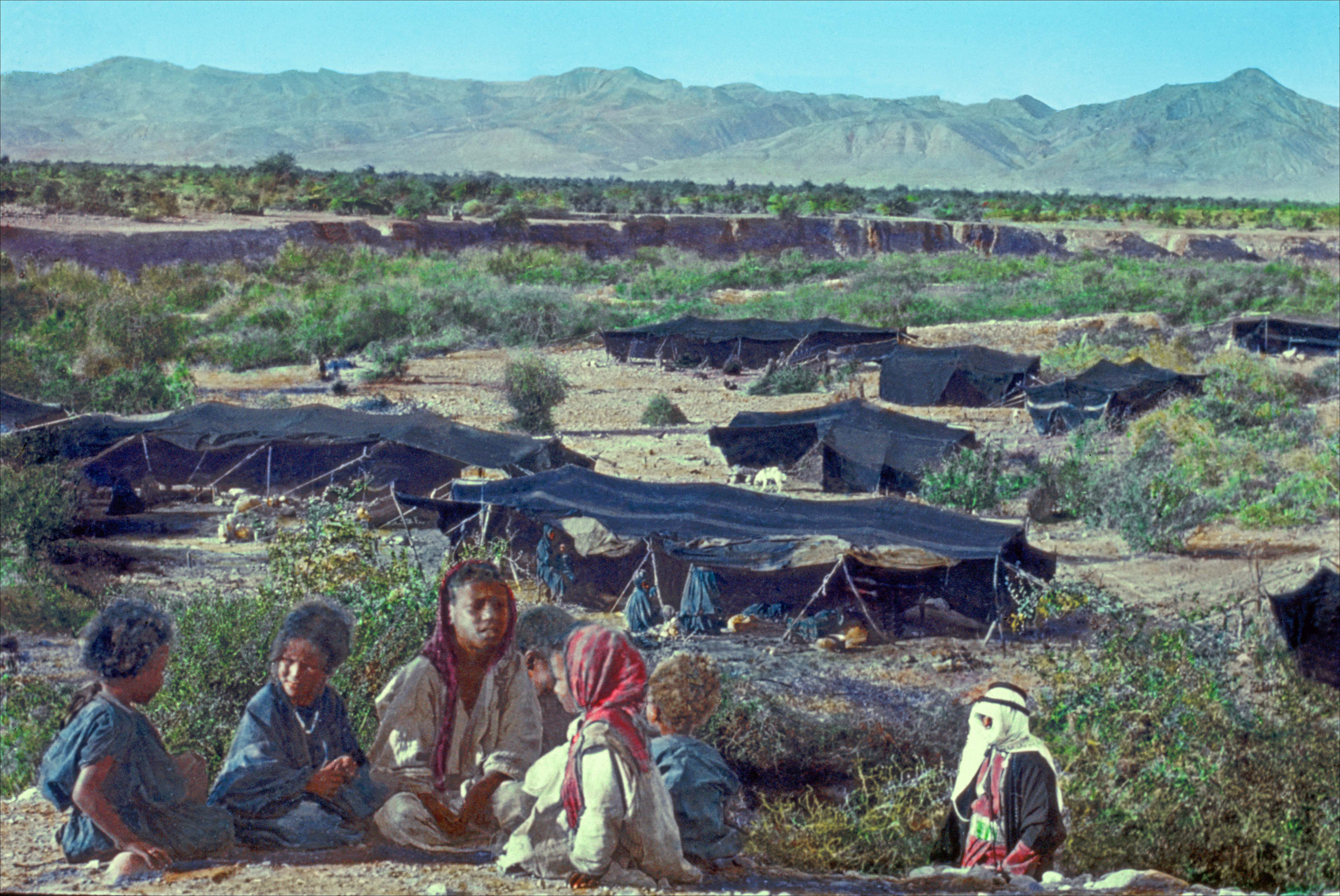 Campement de bédouins entre Jérico et le Mer Morte Valllée d'Anchor. Colorisé.